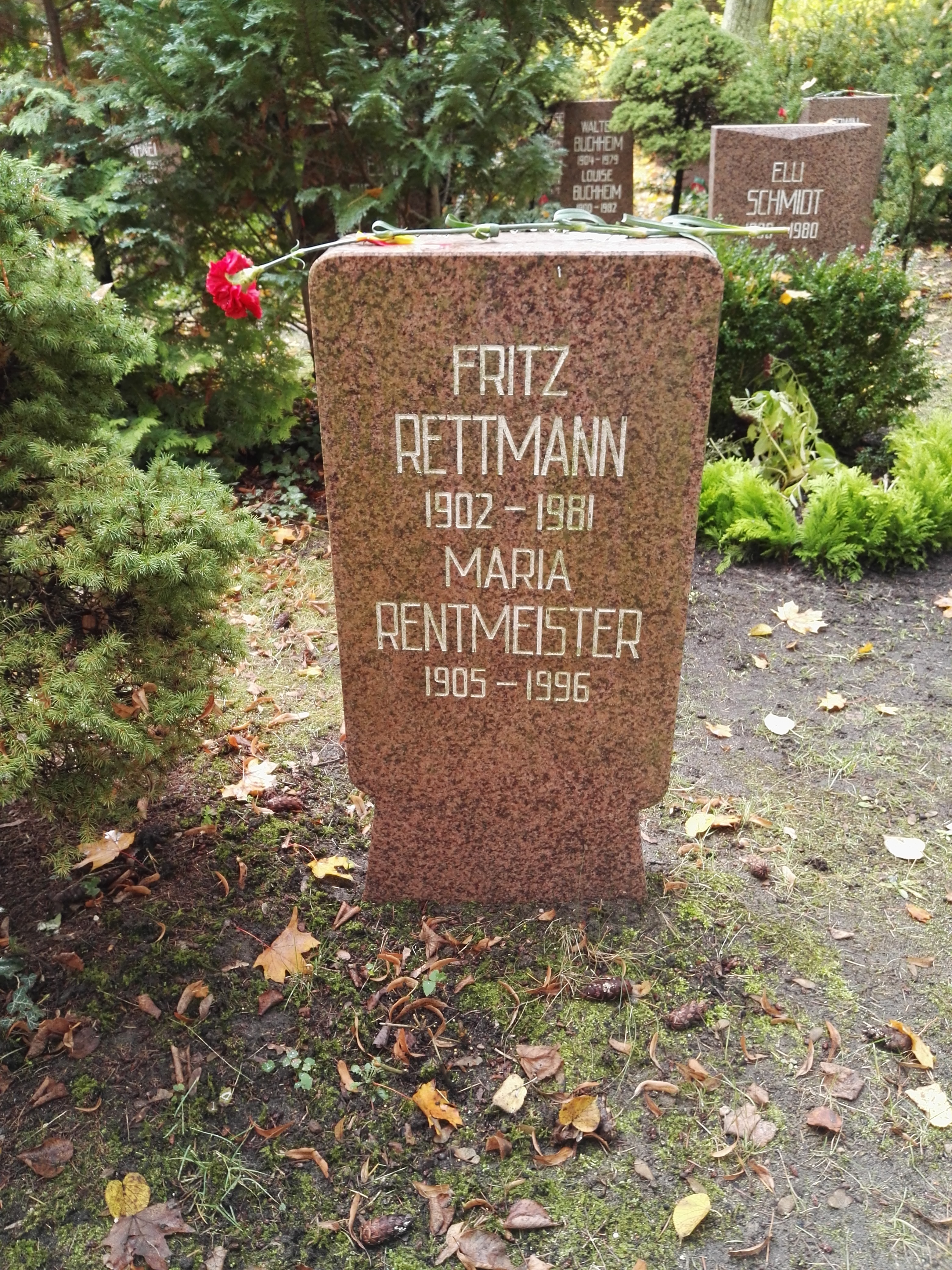 Grab von Maria Rentmeister und Fritz Rettmann auf dem Sozialistenfriedhof des Zentralfriedhofs Friedrichsfelde